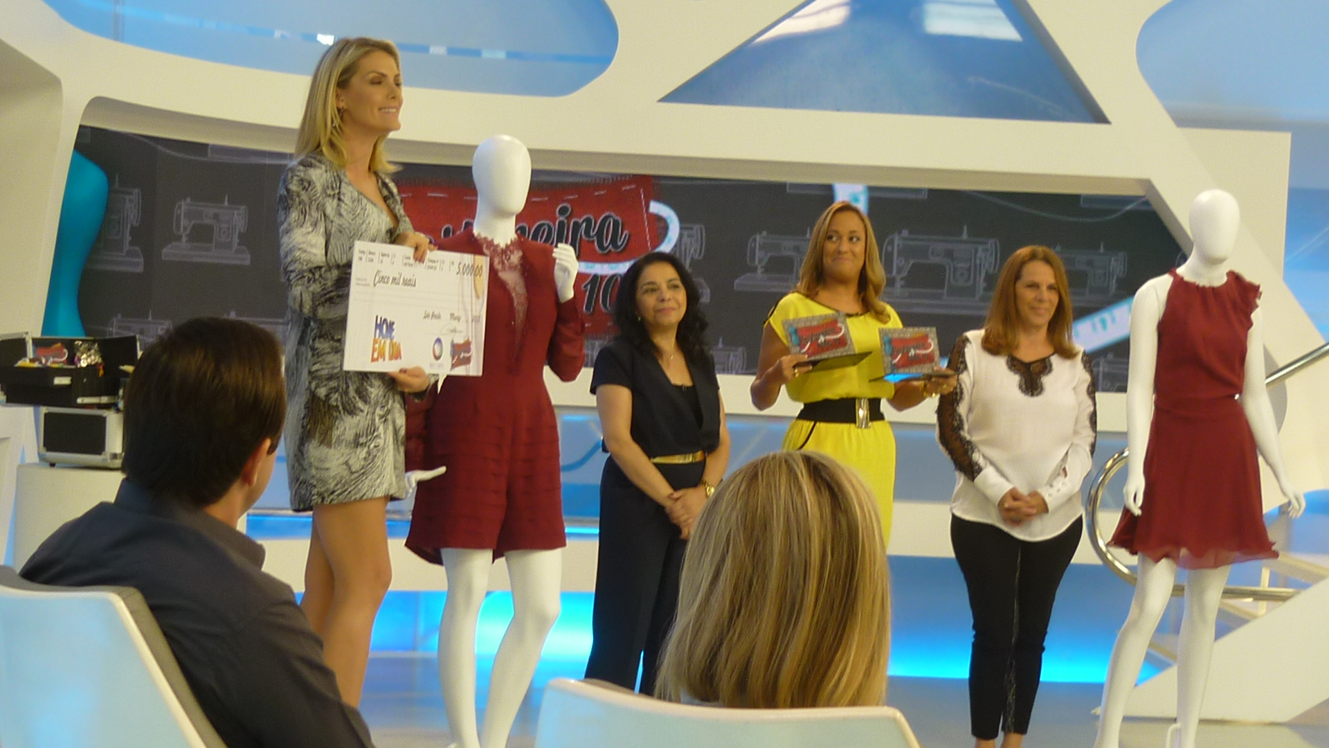 Costureira nota 10